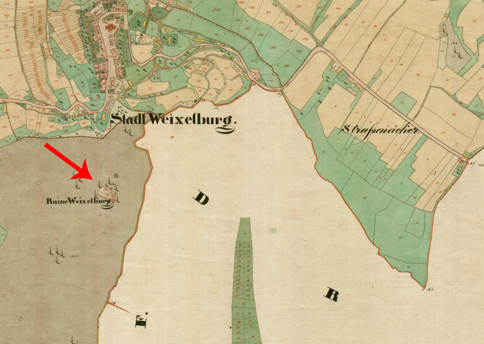 Franciscejski kataster za Kranjsko, 1823-1869